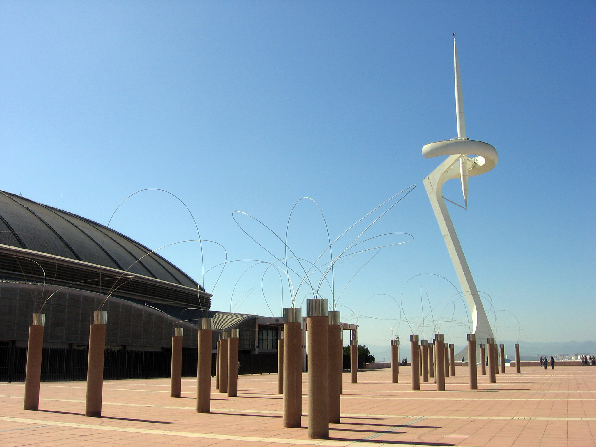 Utsurohi (1990), de Aiko Miyawaki, Paseo de Minici Natal.